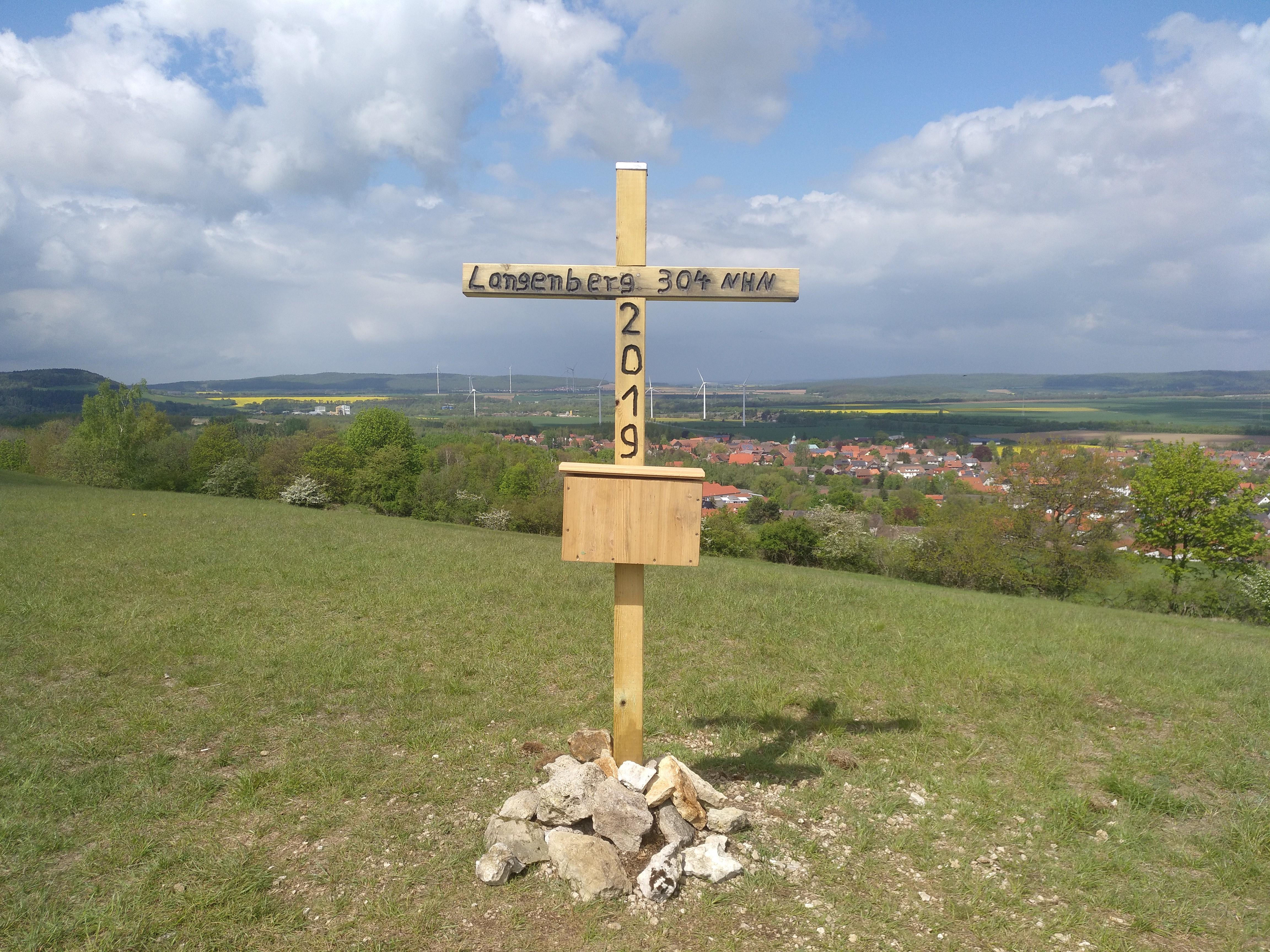 Gipfelkreuz auf dem Langenberg bei Harlingerode, am 20. April 2019 errichtet